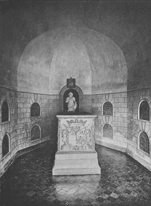 Unteres Schloss in Siegen/Westfalen: Inneres der Fürstengruft im Hauptflügel des Schlosses. Fotografie von Albert Ludorff, 1897. Erstveröffentlichung 1903